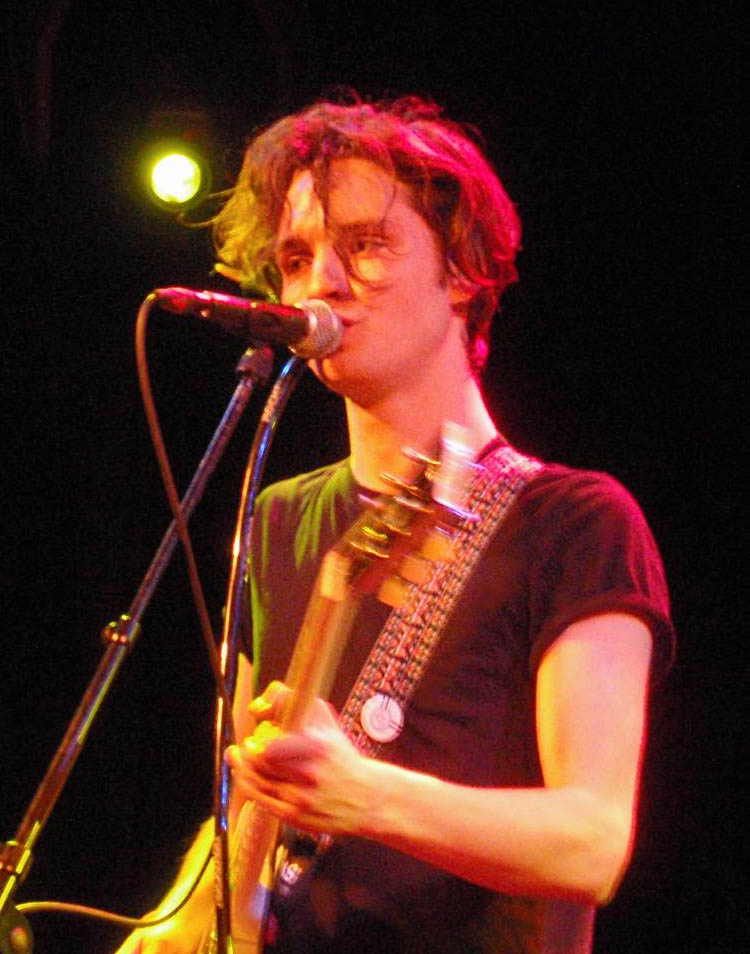 Jett Rebel